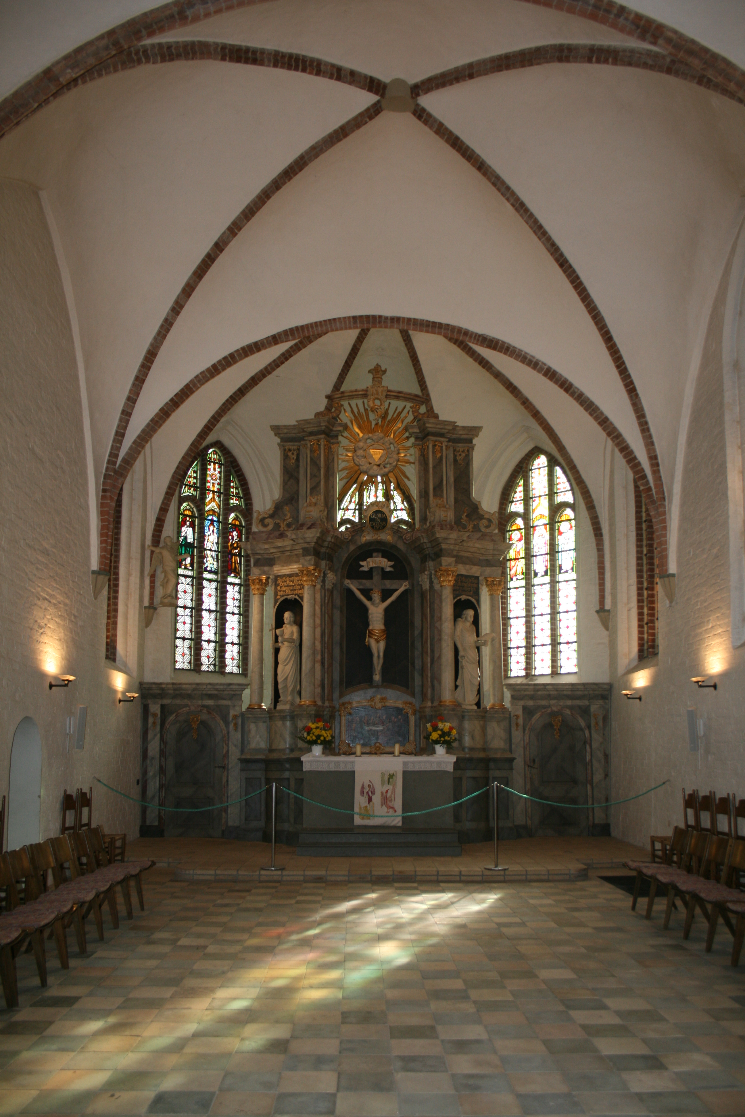 Chor der StJohannes-Kirche in Oldenburg in Holstein (Liste der Kulturdenkmale in Oldenburg in Holstein 14/1)